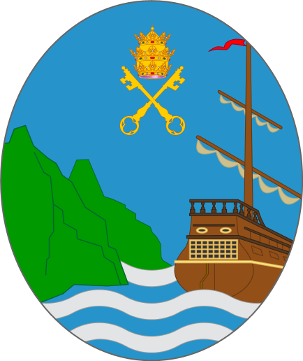 Zumaia herriko armarria